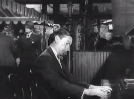 映画「我等生涯の最良の年」オリジナル予告編よりホーギー・カーマイケル